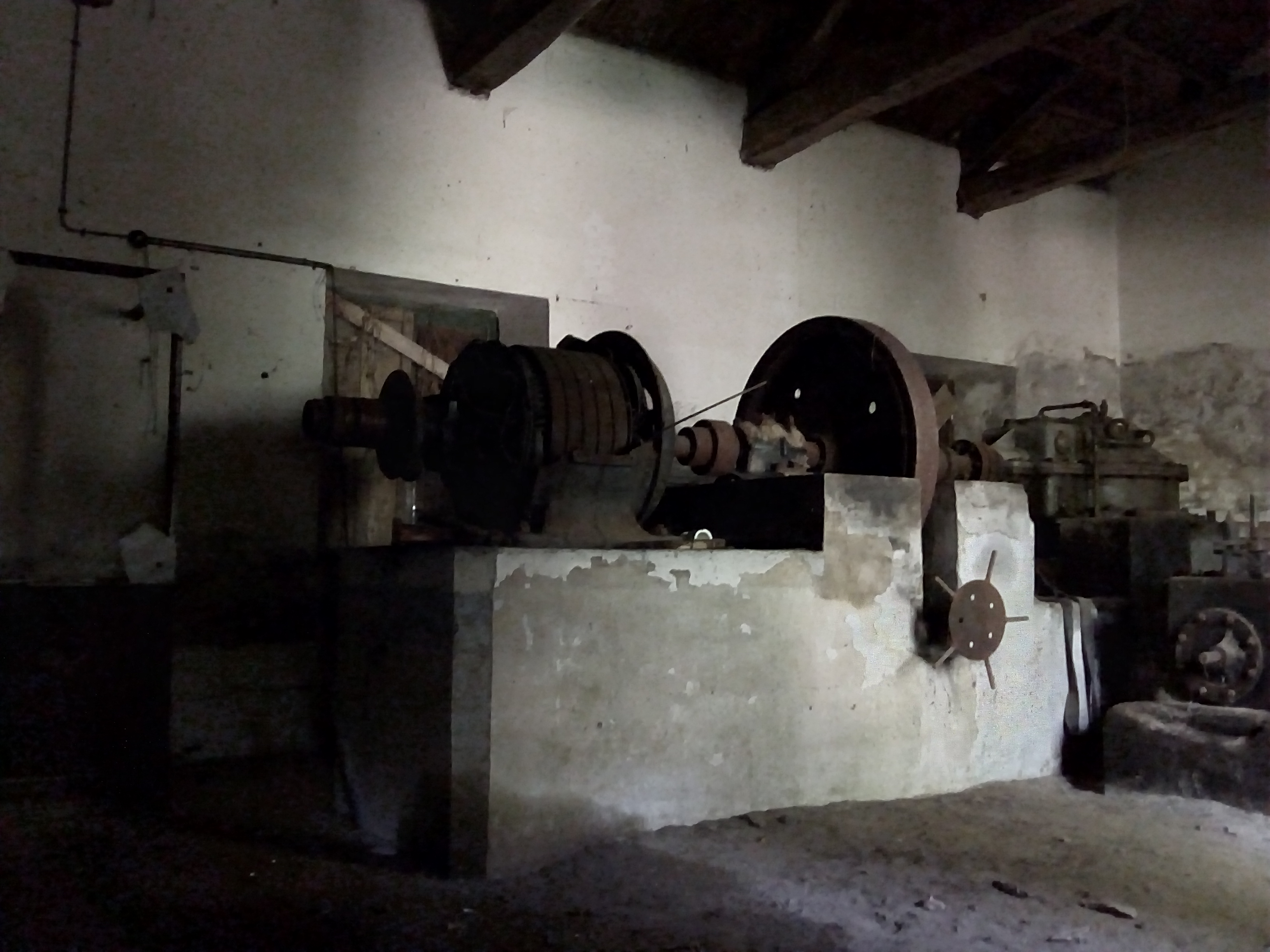 Maquinaria da Central eléctrica do Louredal, río Eo, en Naraído, San Tirso de Abres